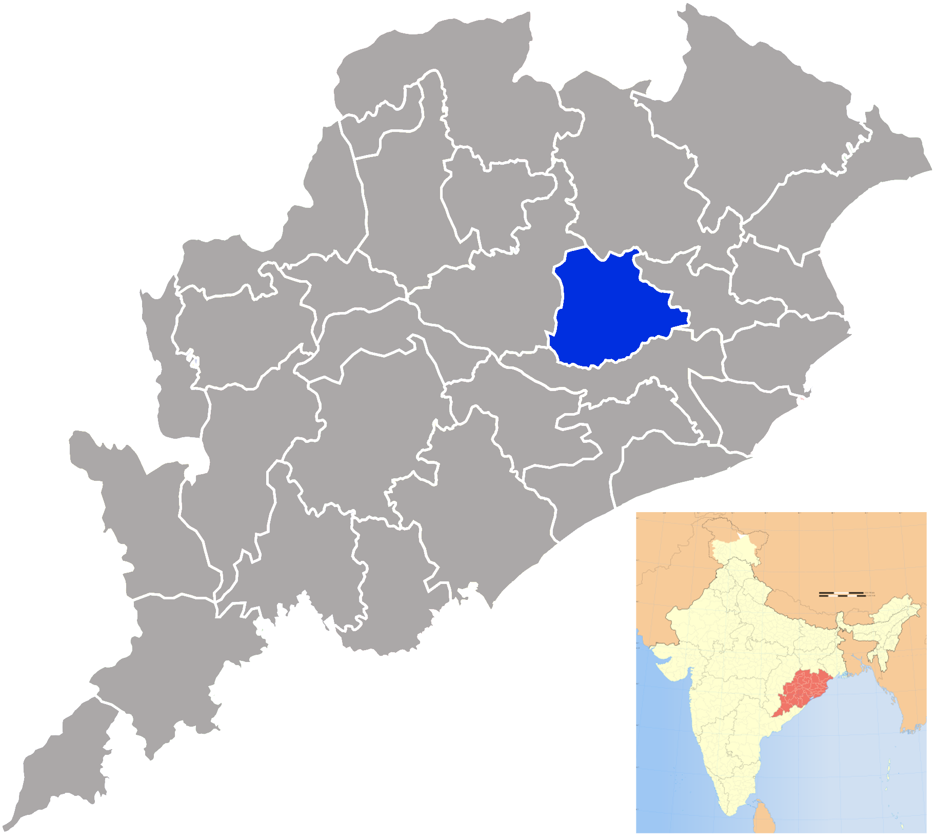 Dhenkanal district in Orissa